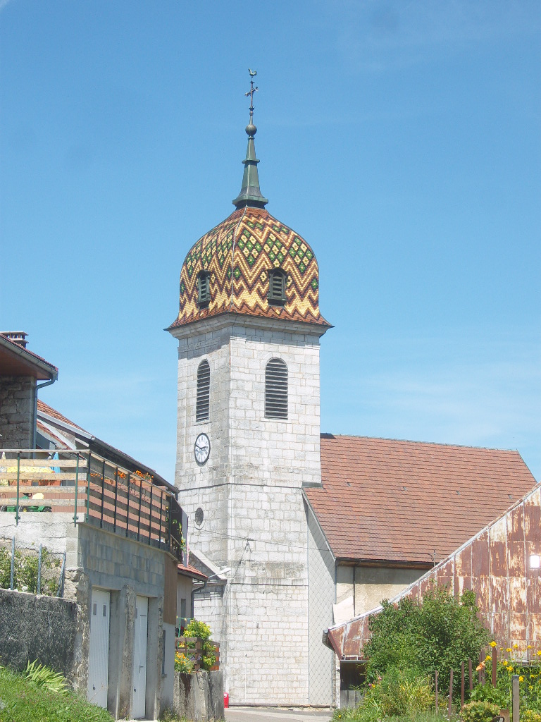 Eglise de Rochejean (Doubs - Frabce)